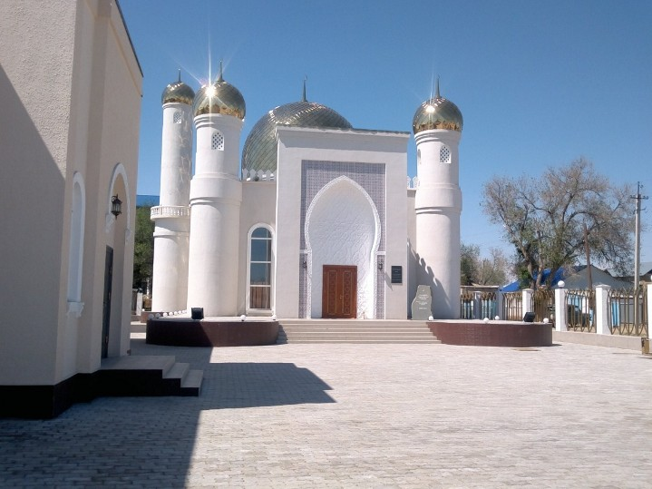 Новая мечеть или Мечеть имени Мате́я (Матая) Кока́нулы (каз.: Мәтей (Матай) Қоқанұлы атындағы мешіт) в городе Шалкар (Актюбинская обл., Казахстан). Построена в 2011 году.)